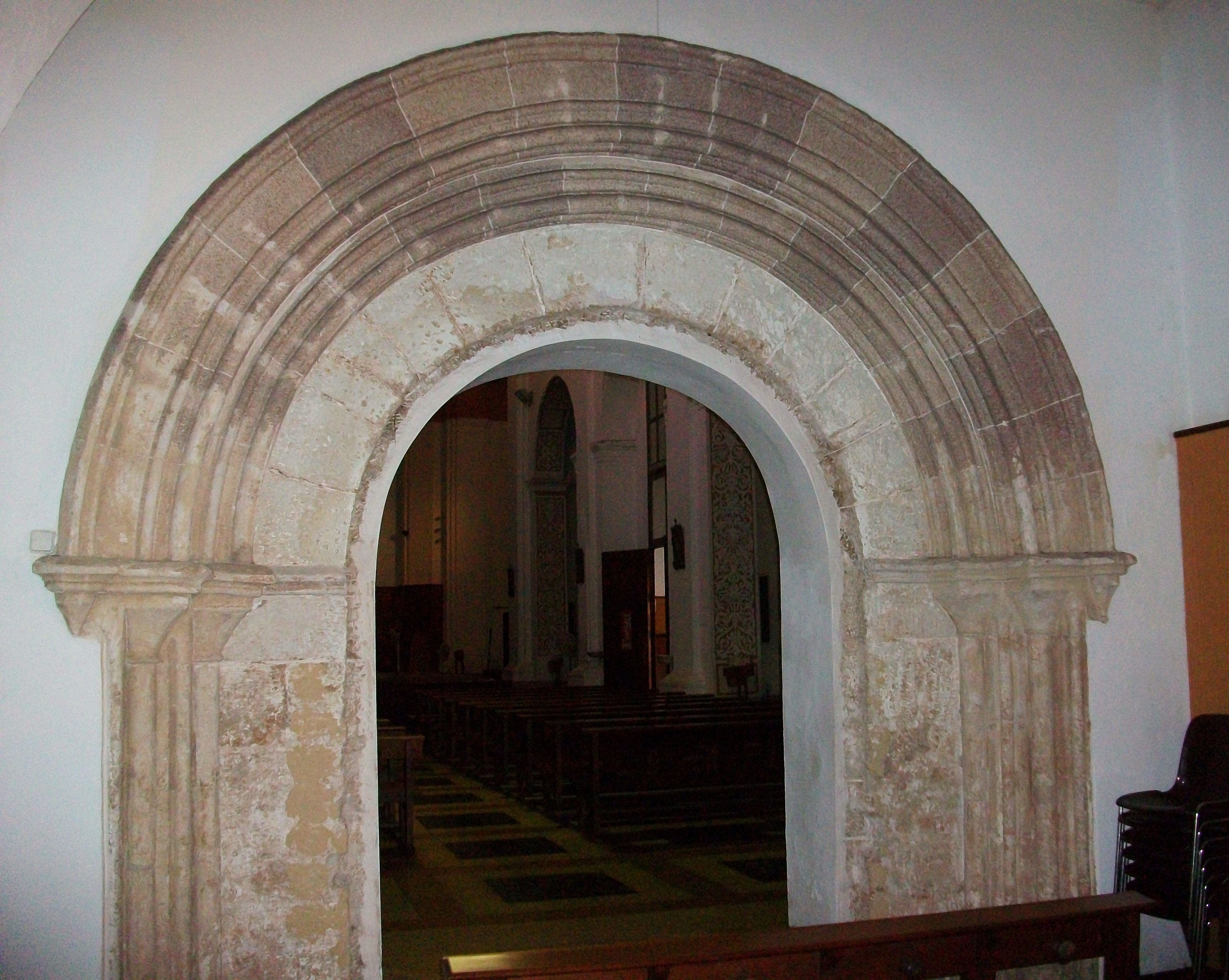 Portada tardorromànica als peus de l'església de sant Vicent de la Roqueta de València.